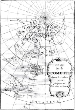 Trajectoire de la comète de 1742. Elle provient du site web Les comètes observées en France au début du XVIIIe siècle